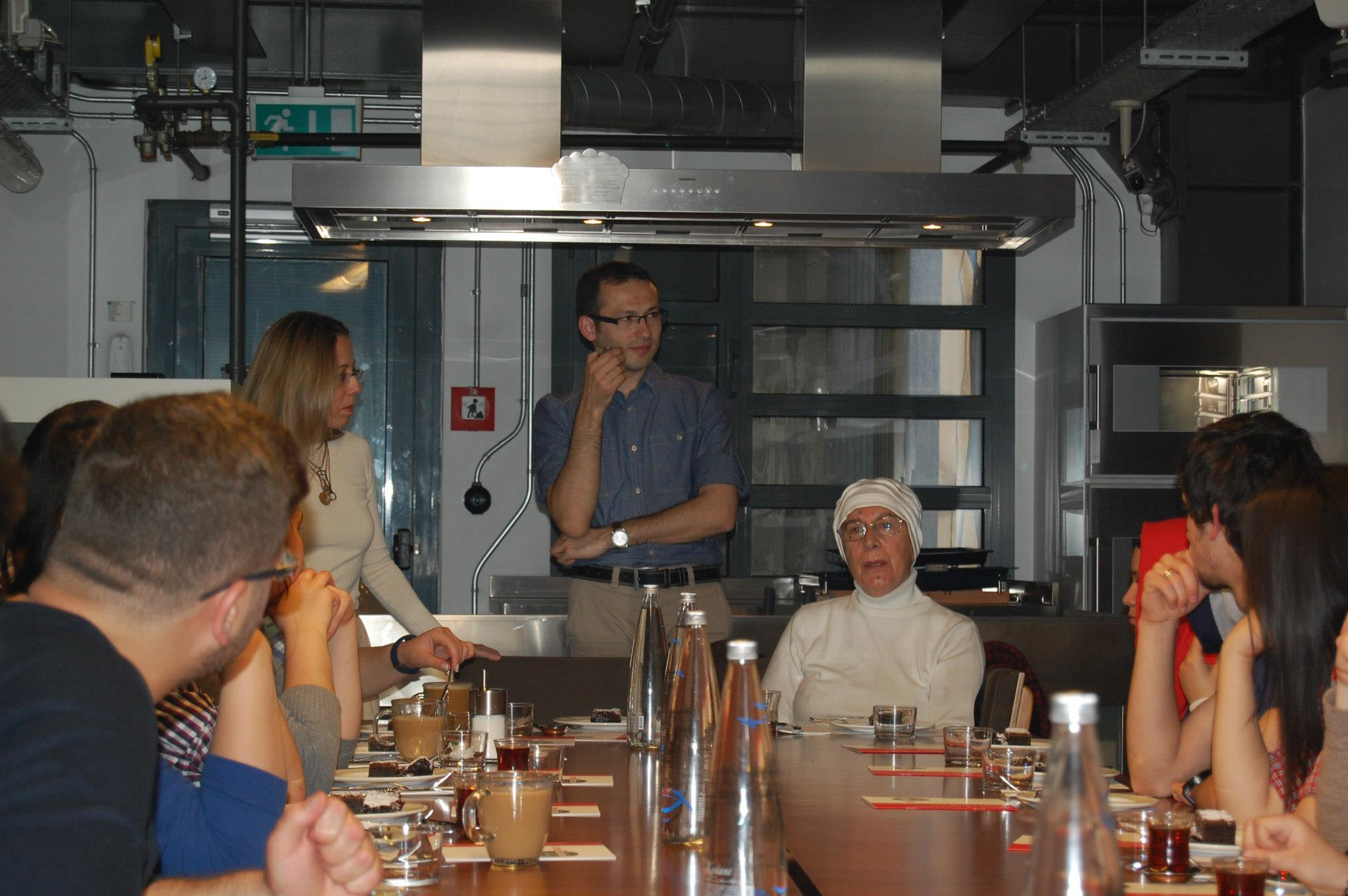 Nevin Halıcı Uludağ Üniversitesi Aşçılık Programı öğrencileriyle İstanbul Culinary Institute'de söyleşi yaparken (24.04.2013)